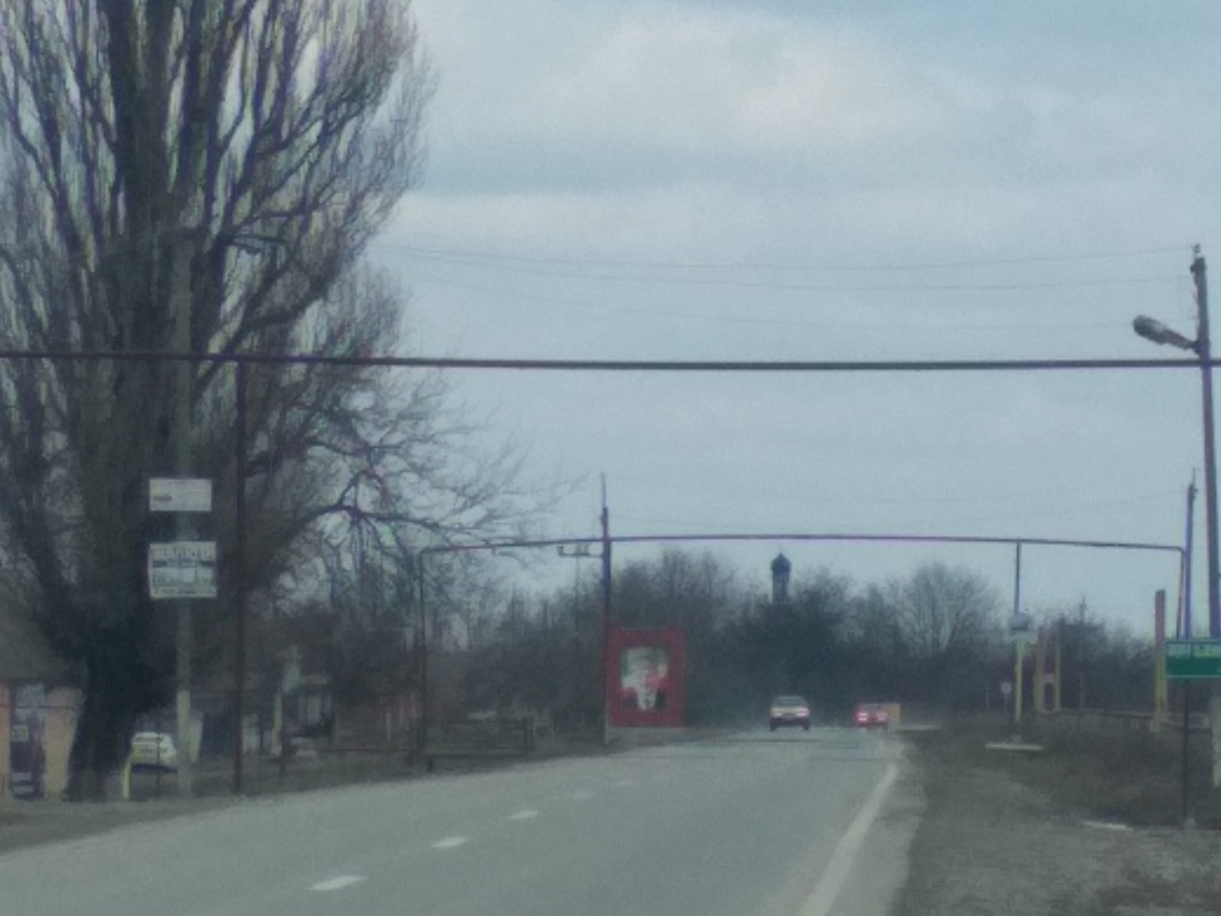 Нохчийн: Борг1анен чувоьдийла